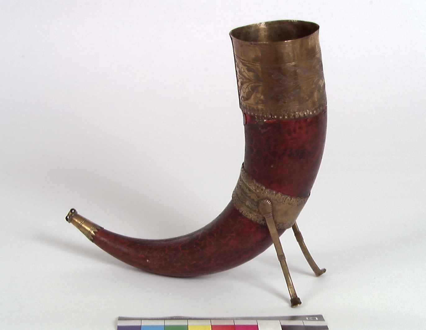 Deveggehornet, antakelig fra slutten av 1600-tallet, fra Devegge i Nes i Hallingdal. Nå på Norsk Folkemuseum i Oslo. NF.1918-0024A